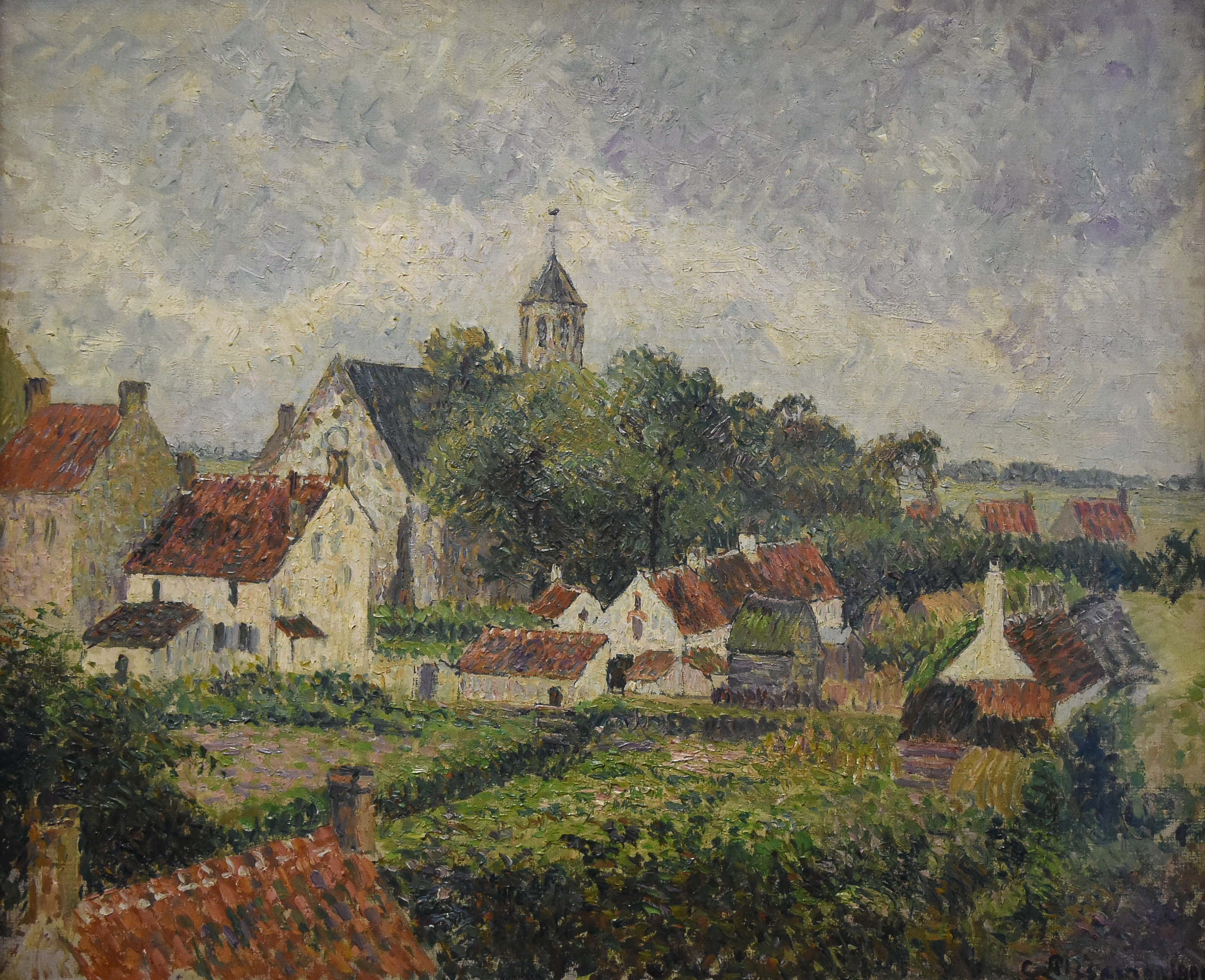 Camille Pissarro (1830-1903) Le village de Knocke (1894) Petit Palais Paris